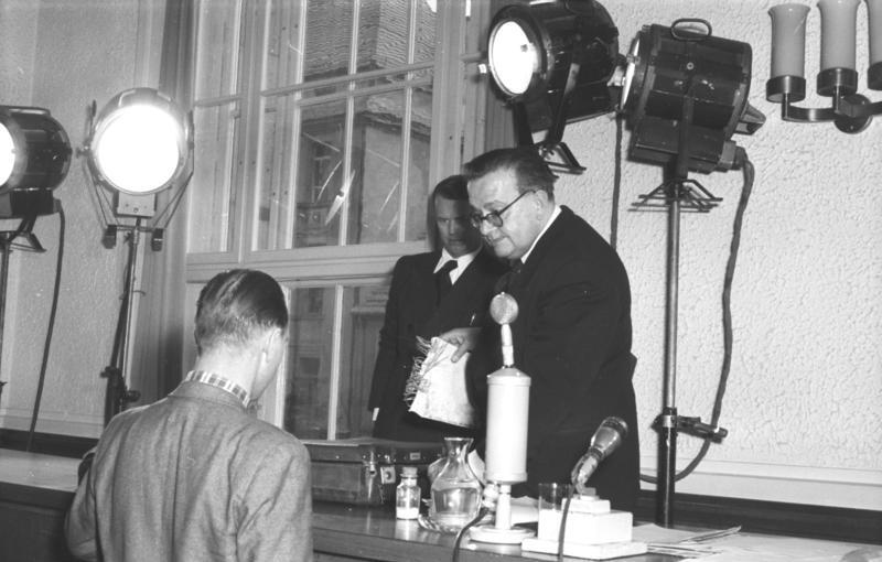 Zentralbild/ Quaschinsky 23.5.52 Prozeß gegen Agentengruppe Vor dem Obersten Gericht der DDR begann am 23.5.52 ein Prozeß gegen eine Bande von Agenten und Saboteuren, die sämtlich der westberliner Hildebrandt-Gruppe gegen die Menschlichkeit angehören. Unter anderem planten die Angeklagten, die Eisenbahnbrücke in Berlin-Erkner mit dem darüber fahrenden "Blauen Express" zu sprengen. UBz: Der Bandenführer Burianeck identifiziert die ihm von Generalstaatsanwalt Ernst Melsheimer vorgelegten Beweisstücke.